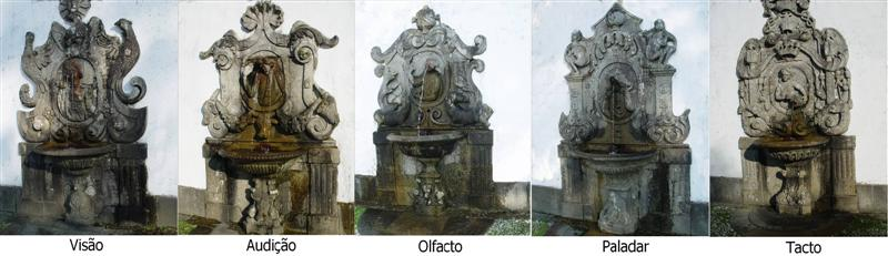 Escadório dos cinco sentidos Bom Jesus Braga Fotos: Jose Goncalves